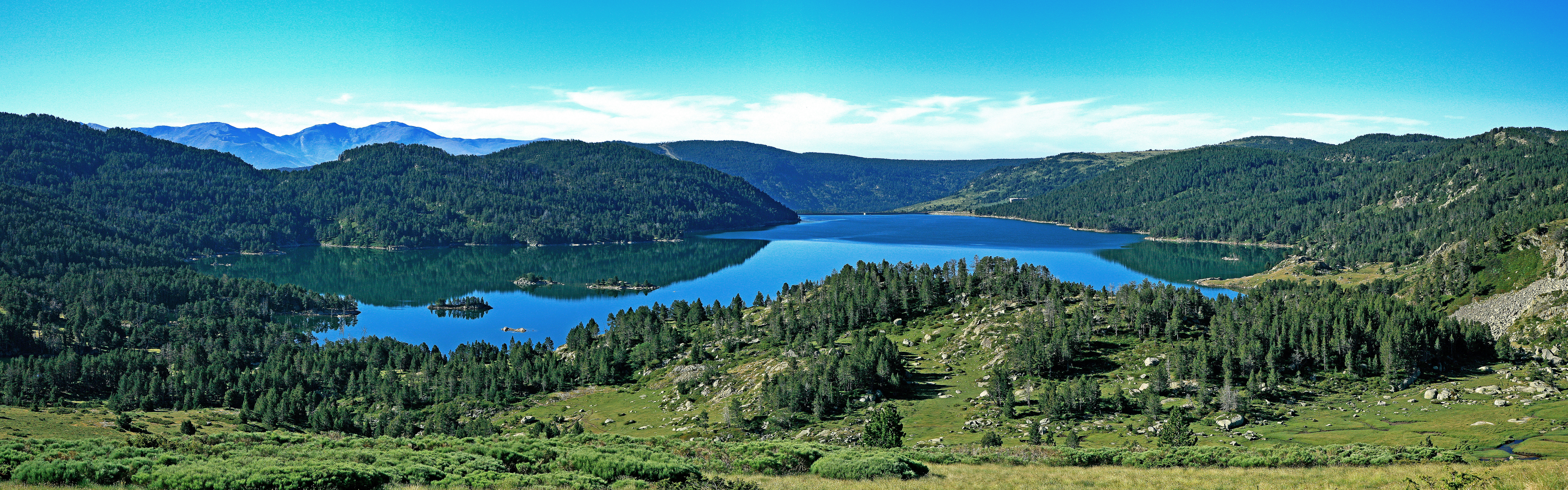 Bouillouses